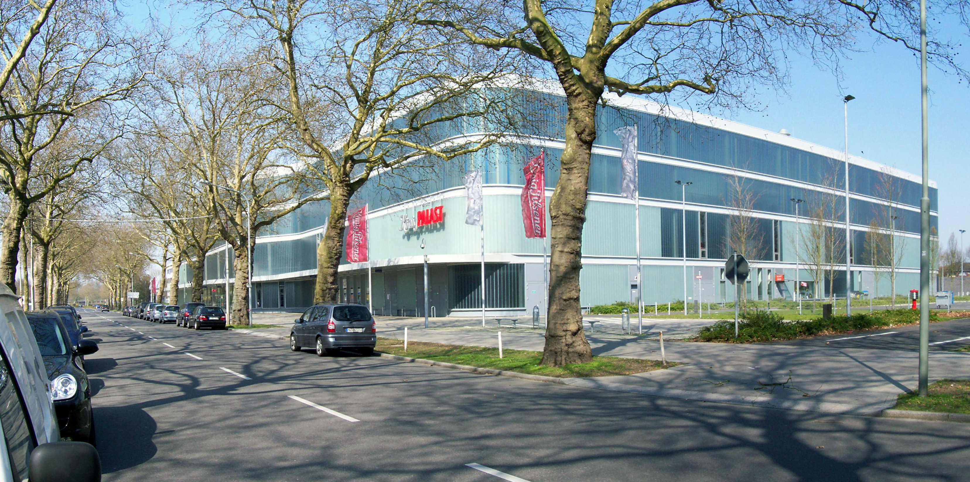 Bildbeschreibung: KönigPALAST, Krefeld Quelle: selbst fotografiert Fotograf/Zeichner: DER UNFASSBARE